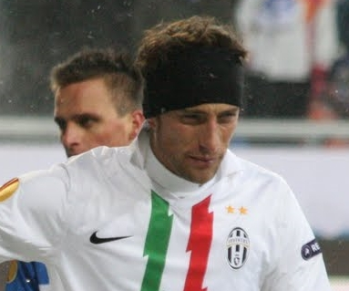 Marchisio a difende il primo palo su un calcio d'angolo